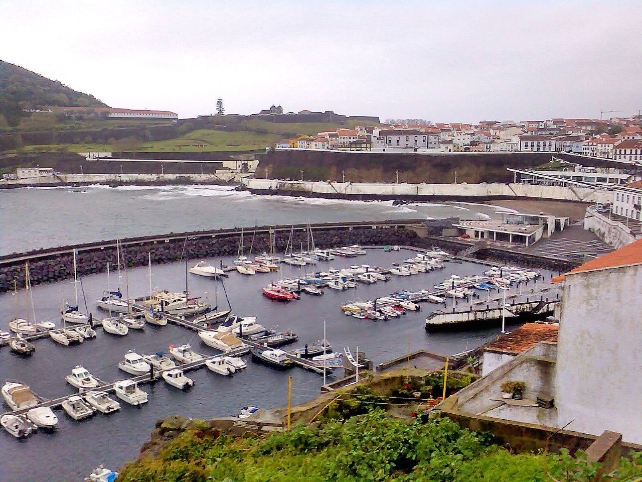 Portugal Azores Terceira island